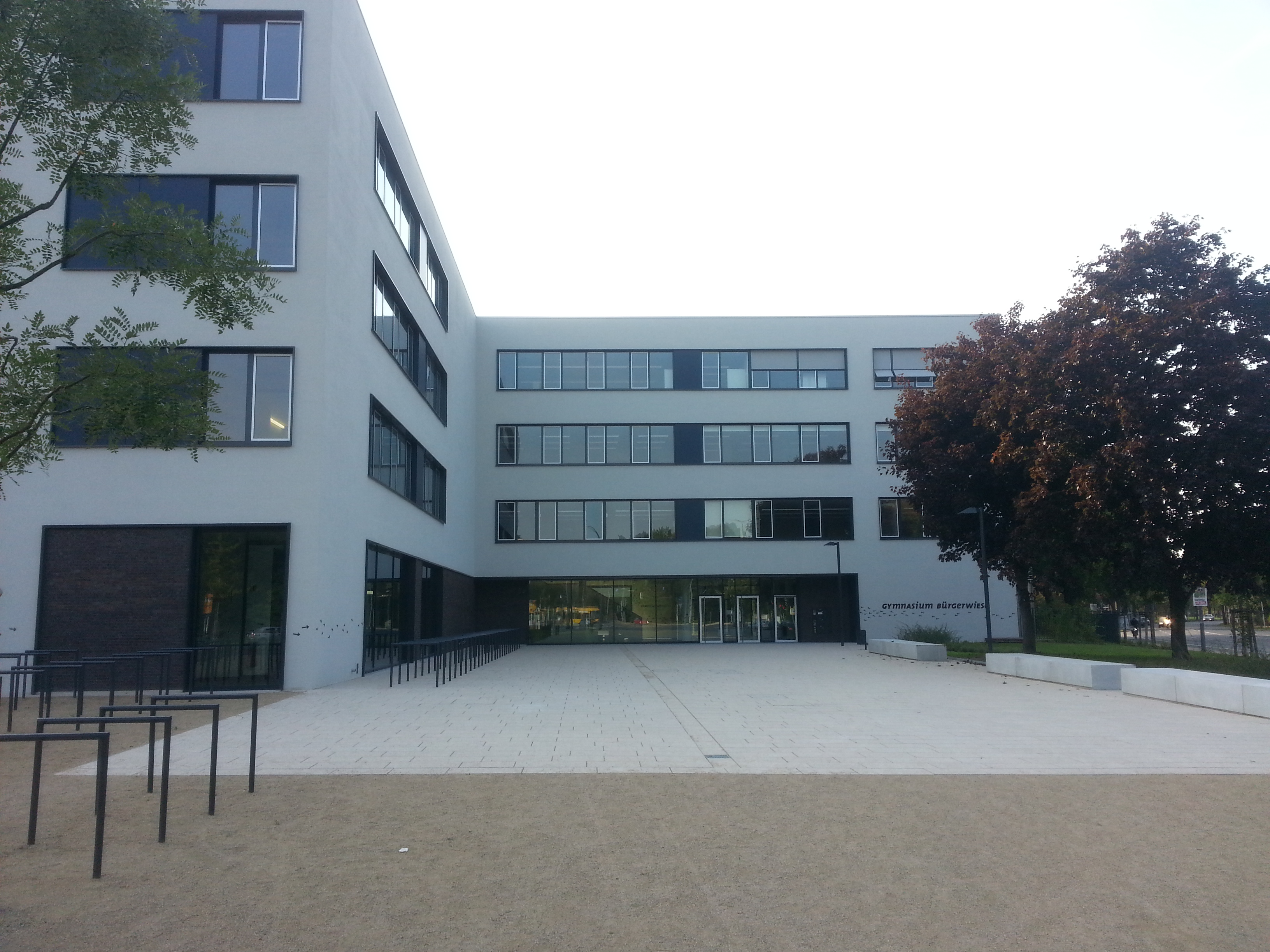 Neubau 2014